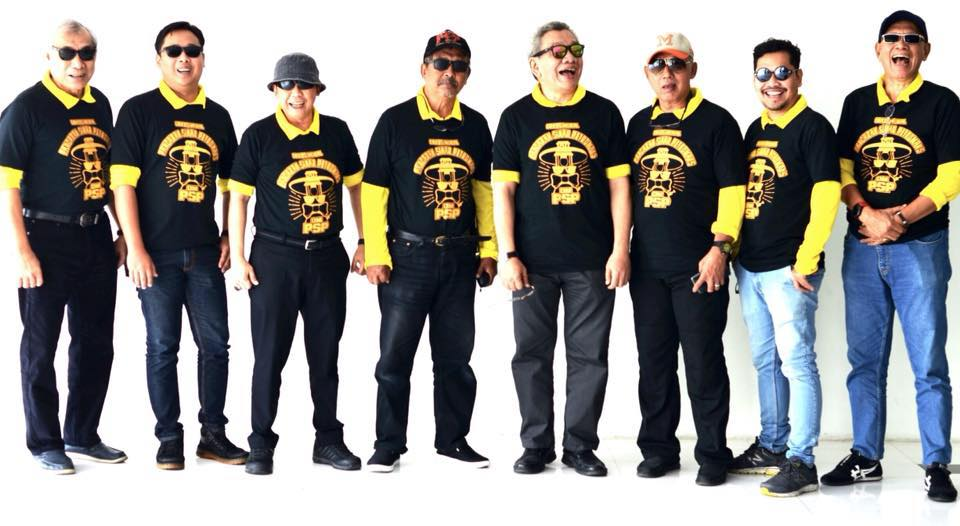 Orkes Moral Pancaran SInar Petromaks (1978-sekarang)